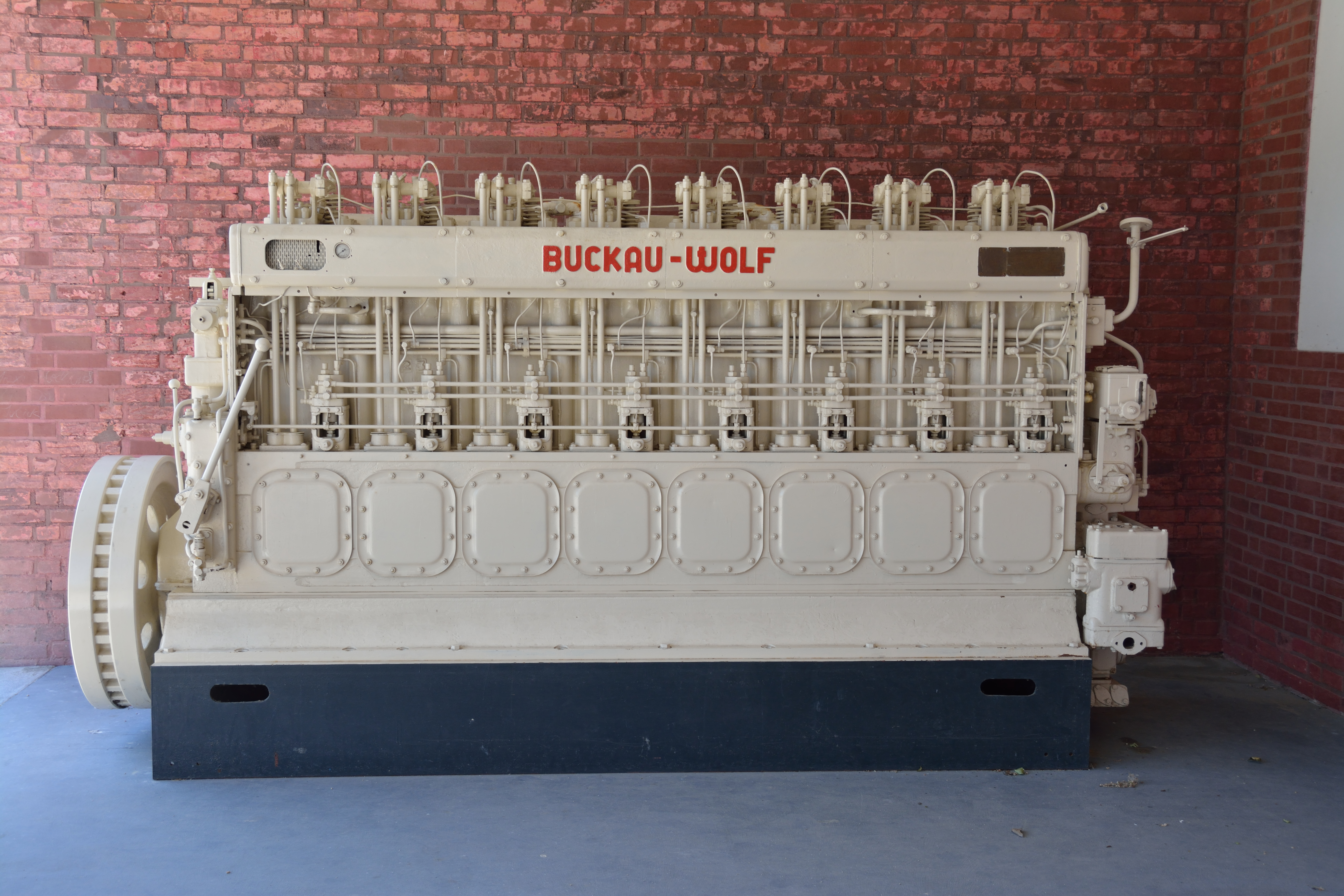 Impressionen vom PhanTECHNIKUM in Wismar.